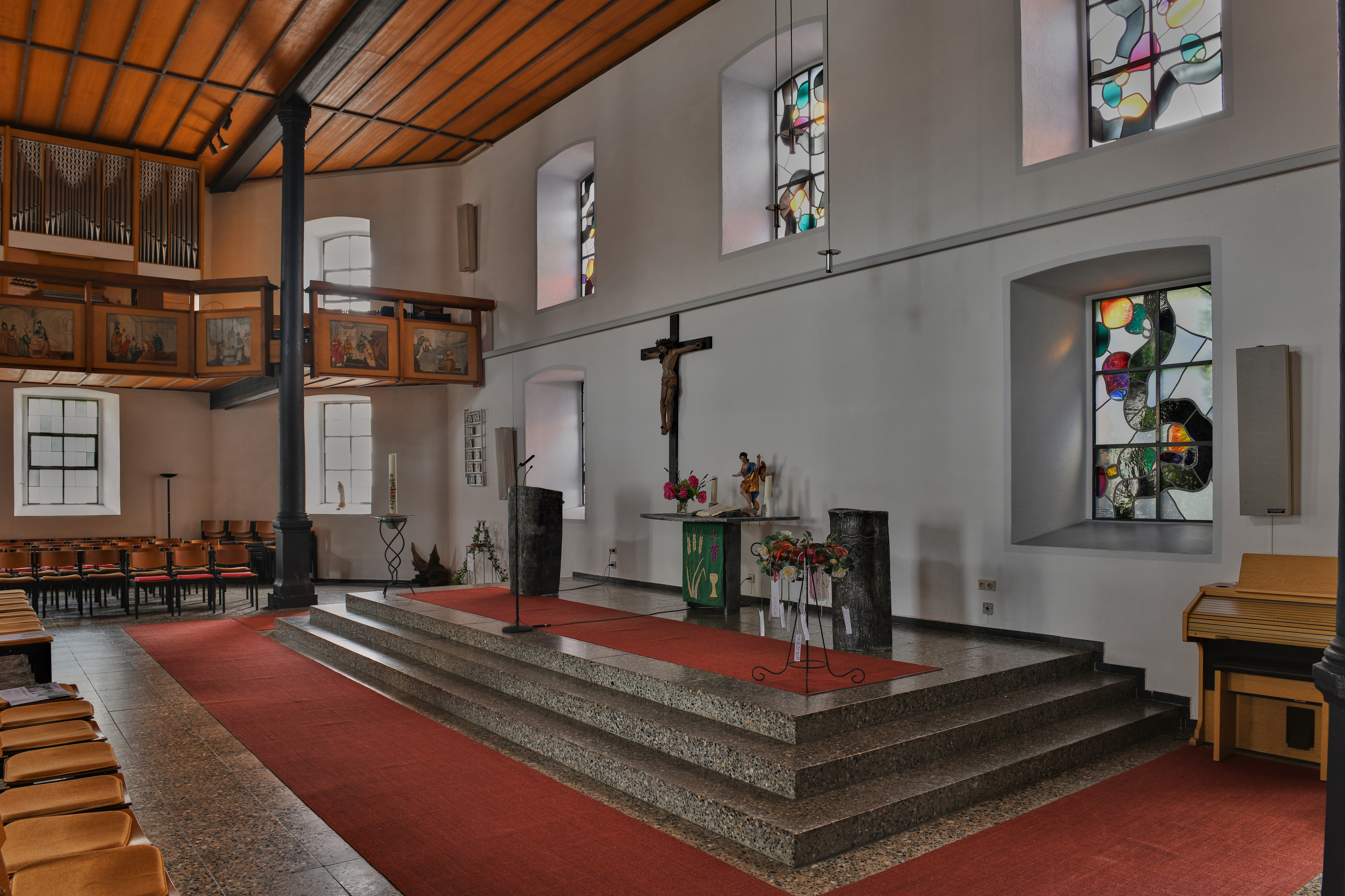 Hauinger Kirche: Altar